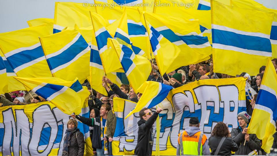 YWP Tifo